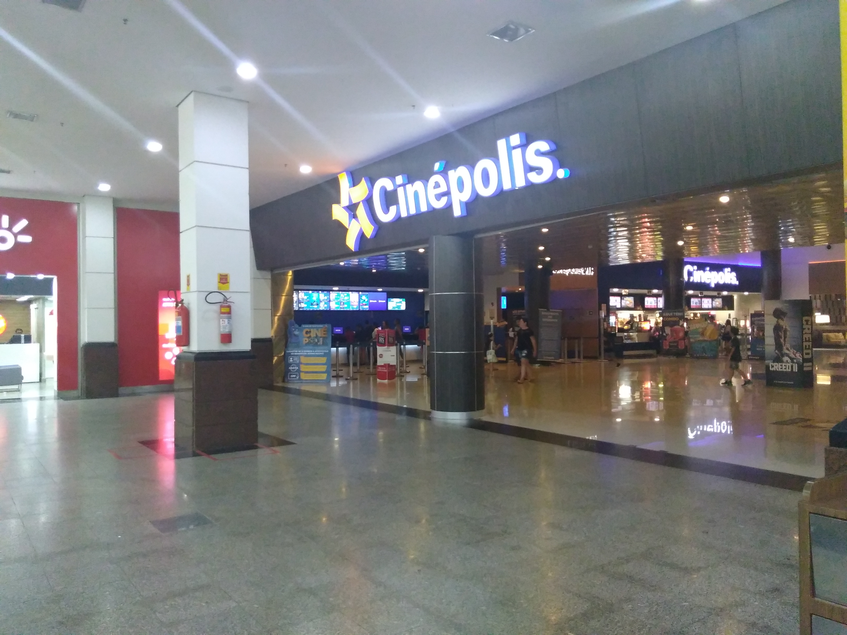 Áreas internas e externas do cinema Cinépolis São Luís Shopping